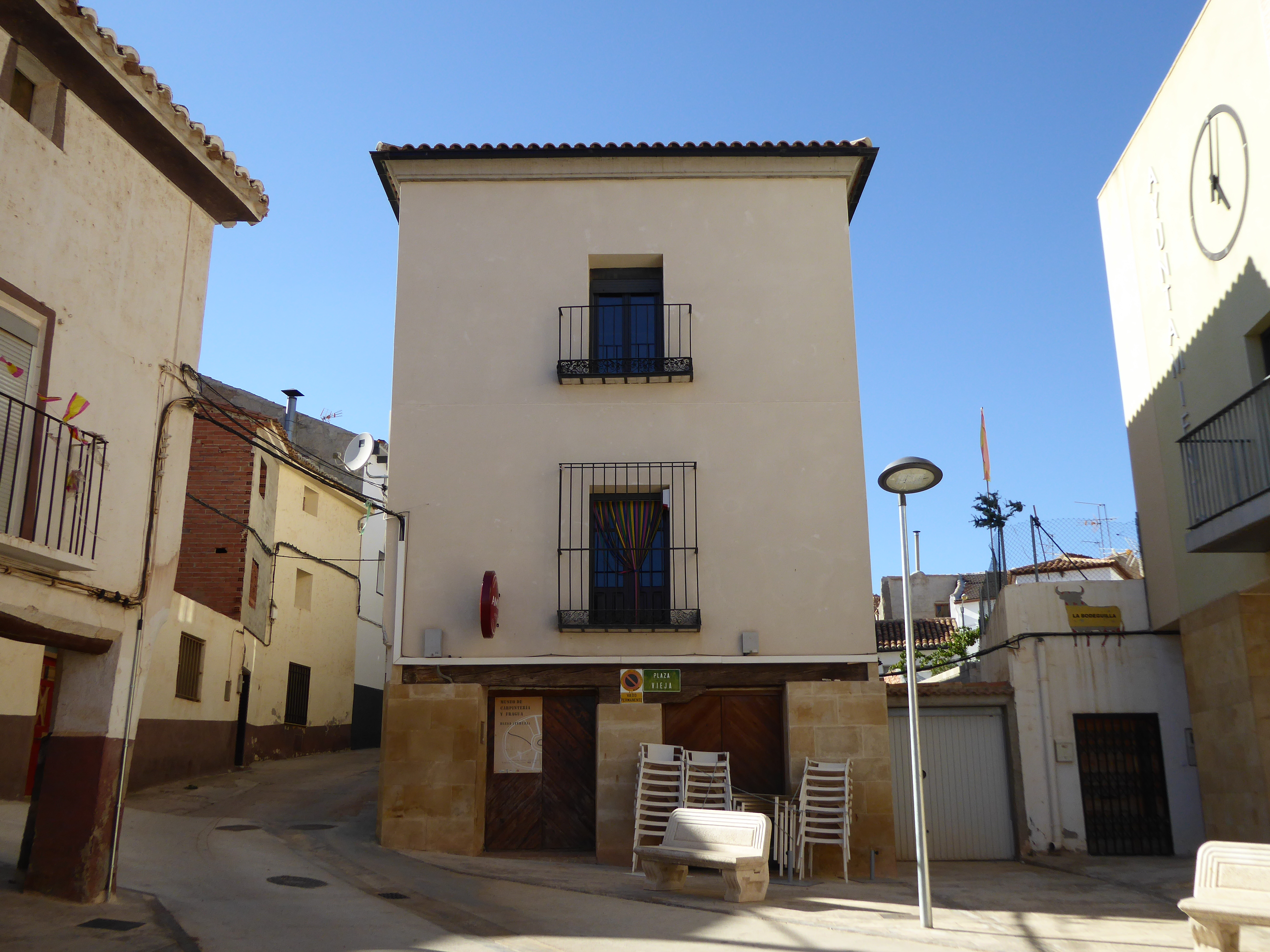 Blesa